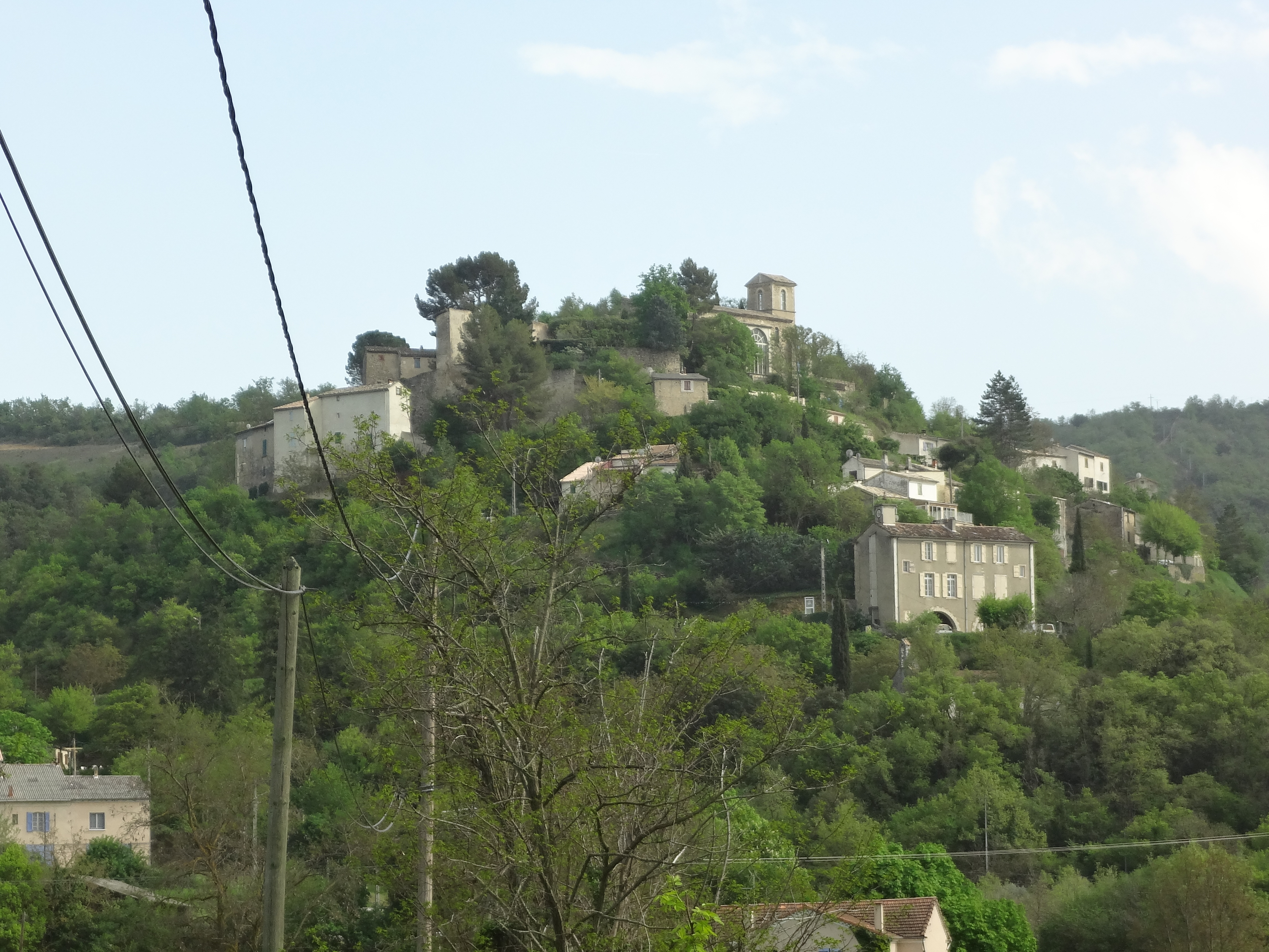 Village de Brunet, du nord